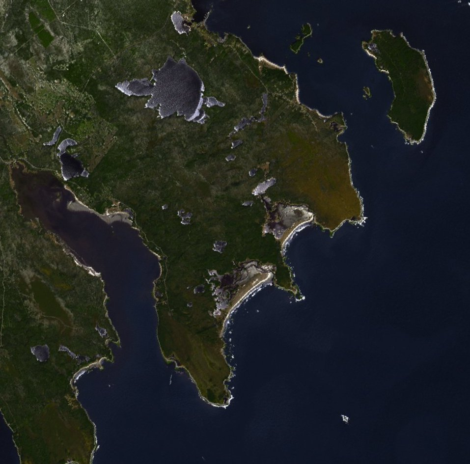 Image Aster (photo prise le 1er février 2008) de la péninsule de Port Mouton en Nouvelle-Écosse. On distingue les deux lagunes faisant partie du parc national Kejimkujik (bord de mer).